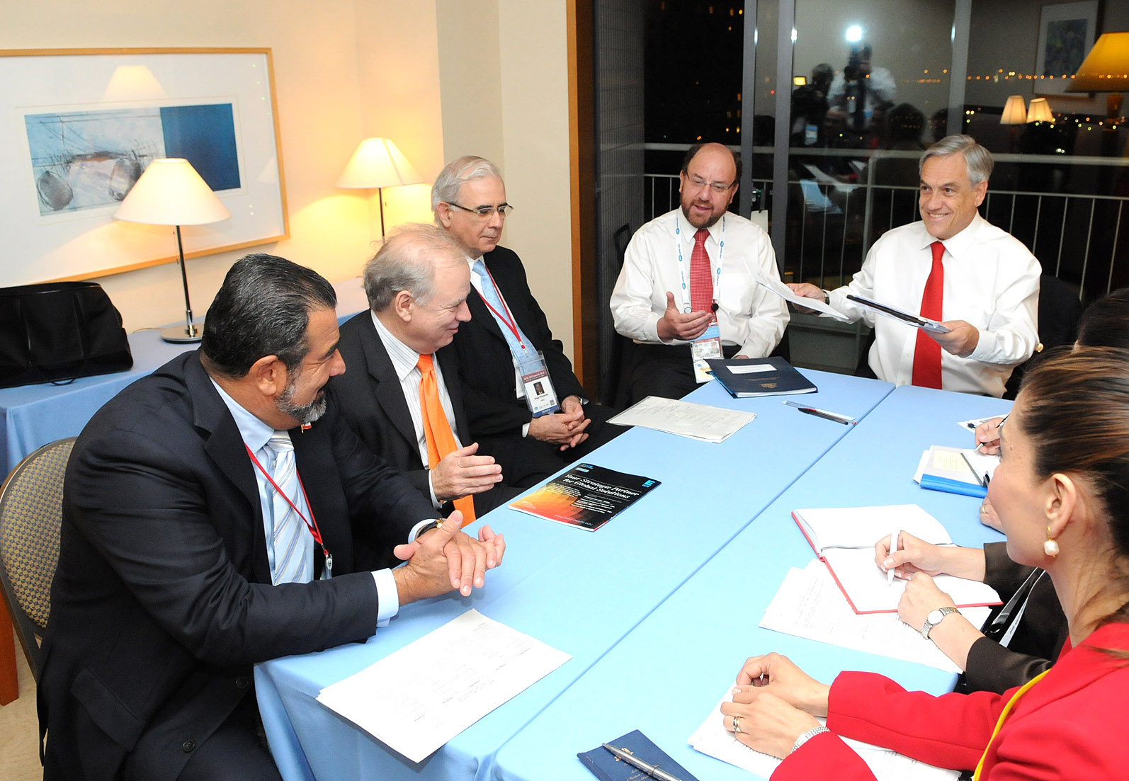 Reunión con equipo APEC Chile, Japón.